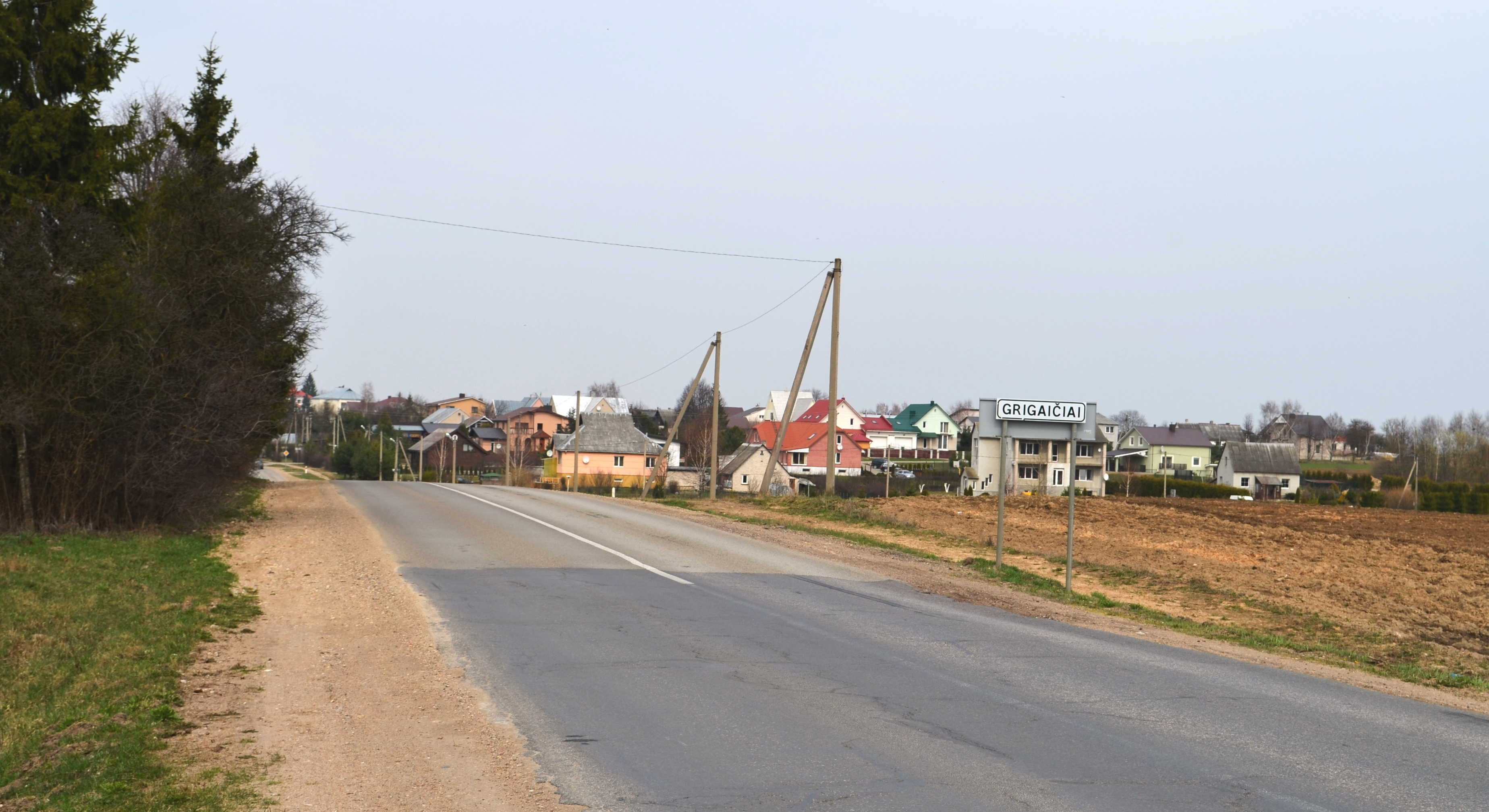 Grigaičiai, Vilniaus raj. (prie N. Vilnios)